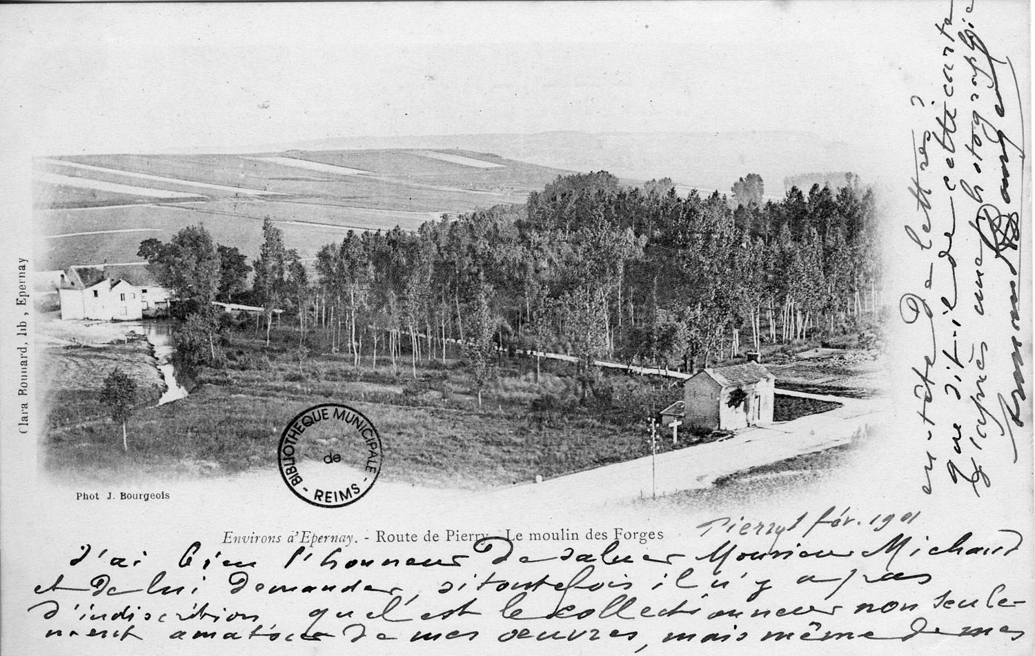 sur une vue ancienne.